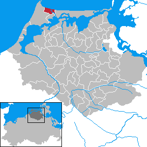 Prerow in Mecklenburg-Vorpommern - District Nordvorpommern